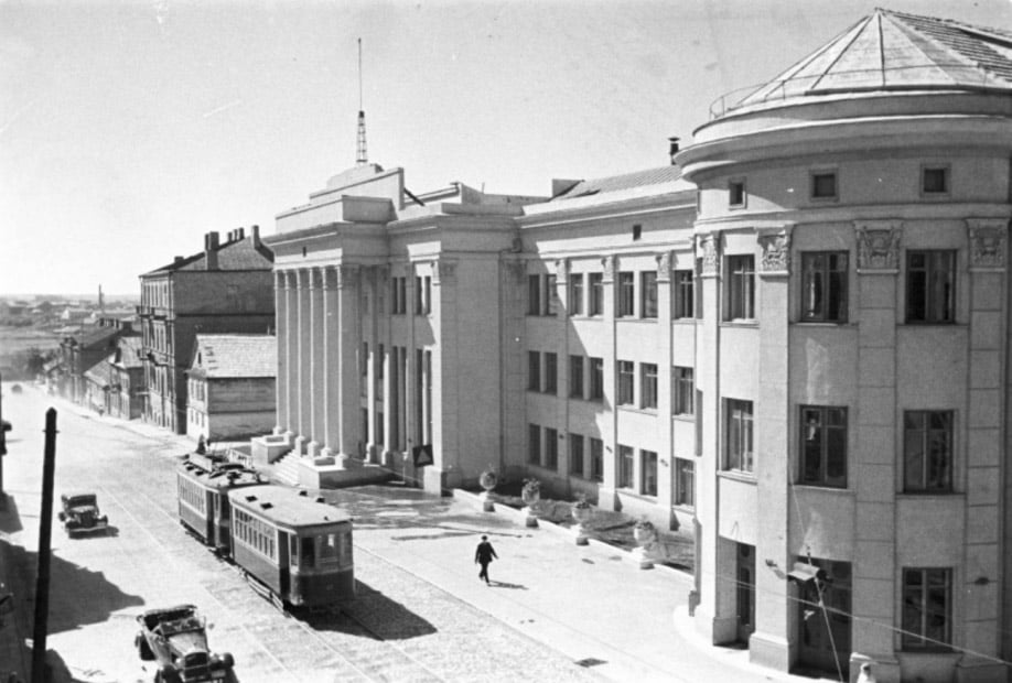 Беларуская (тарашкевіца): Менск (Miensk), вуліца Дамініканская (vulica Daminikanskaja) ад скрыжаваньня з Унівэрсытэцкай (vulica Ŭniversyteckaja). Тэатар юнага гледача